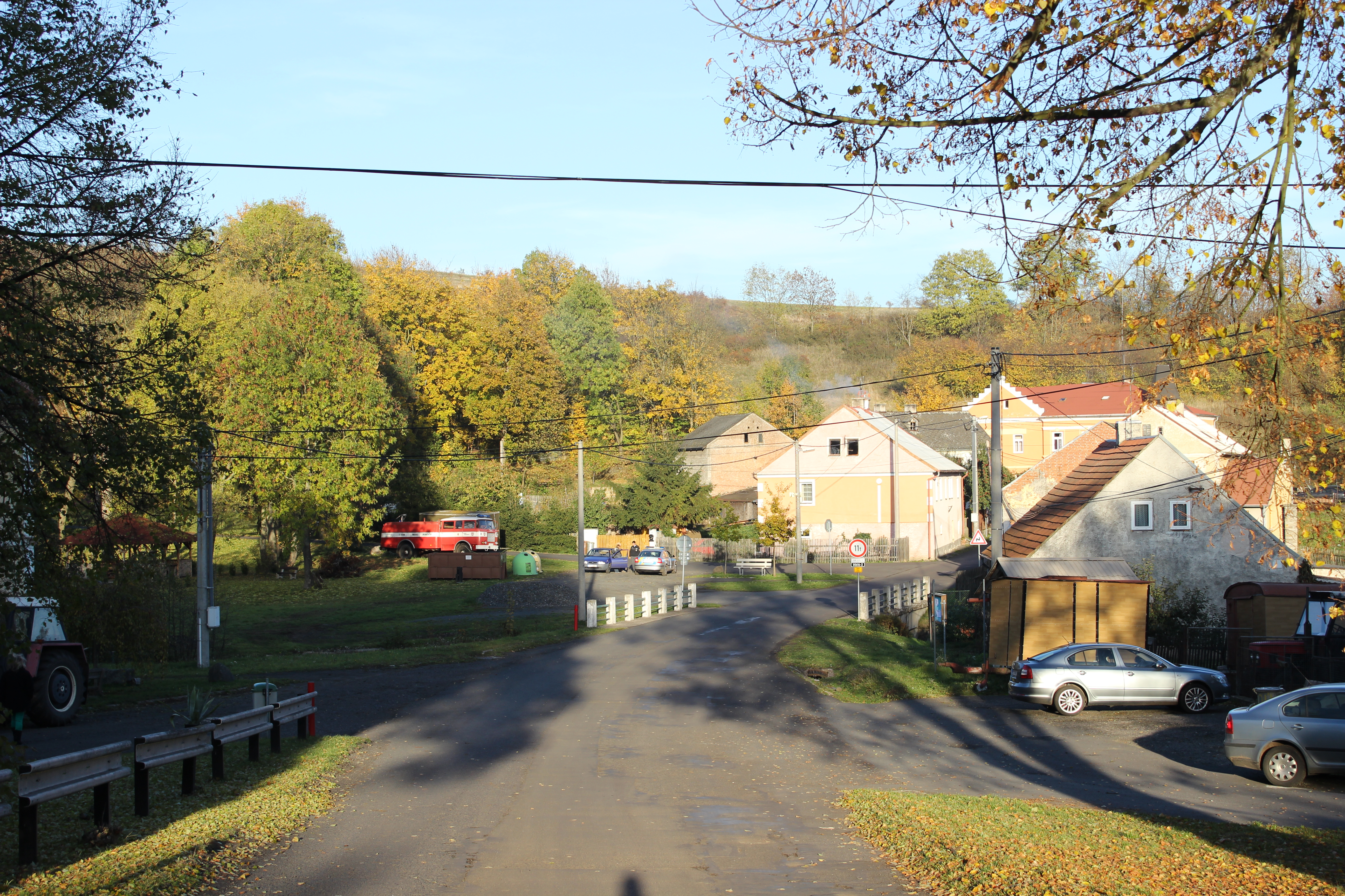 Centrum obce Luka, části Verušiček.